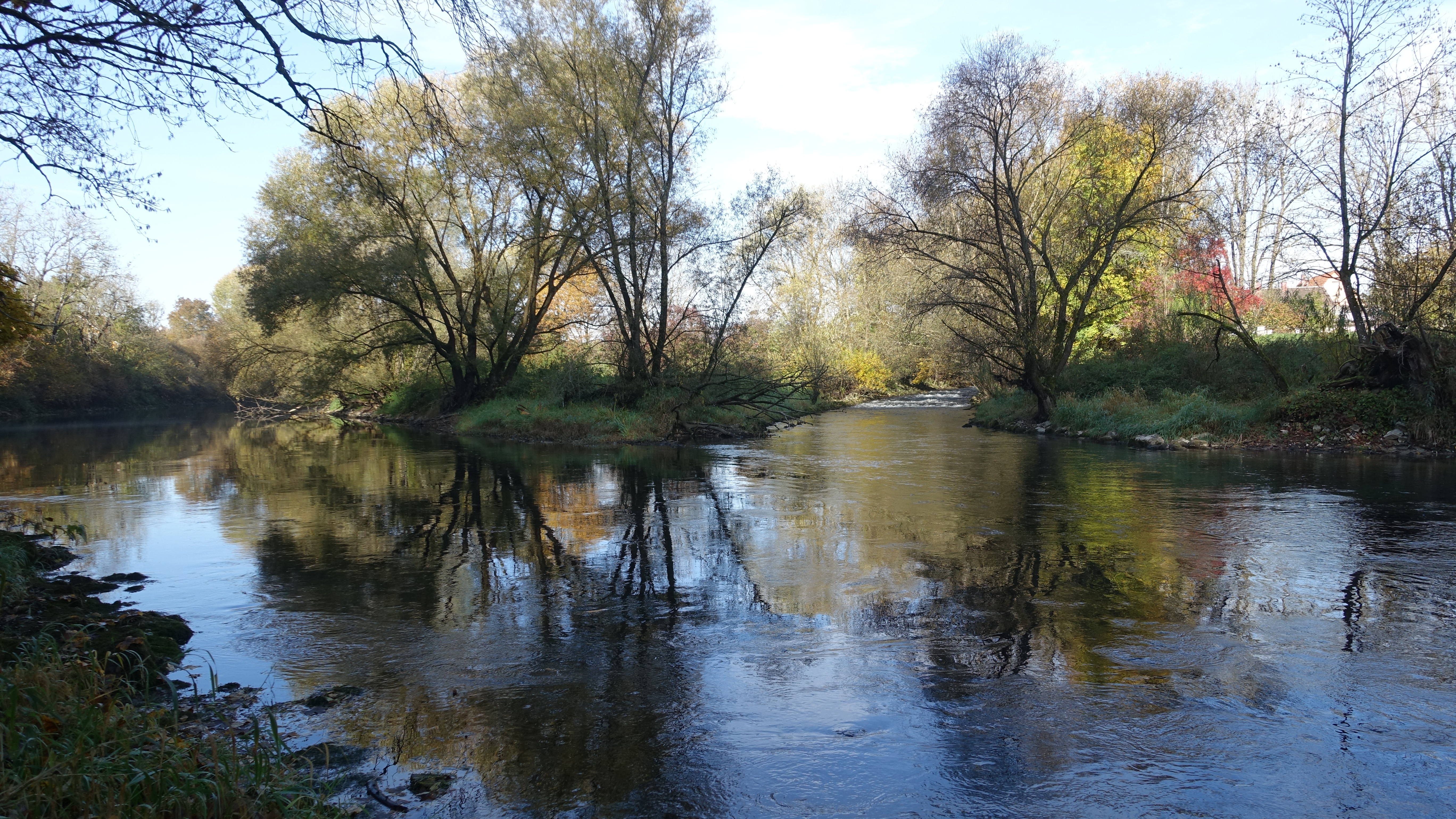 Sigmaringendorf - Donauufer mit Lauchertmündung rechts